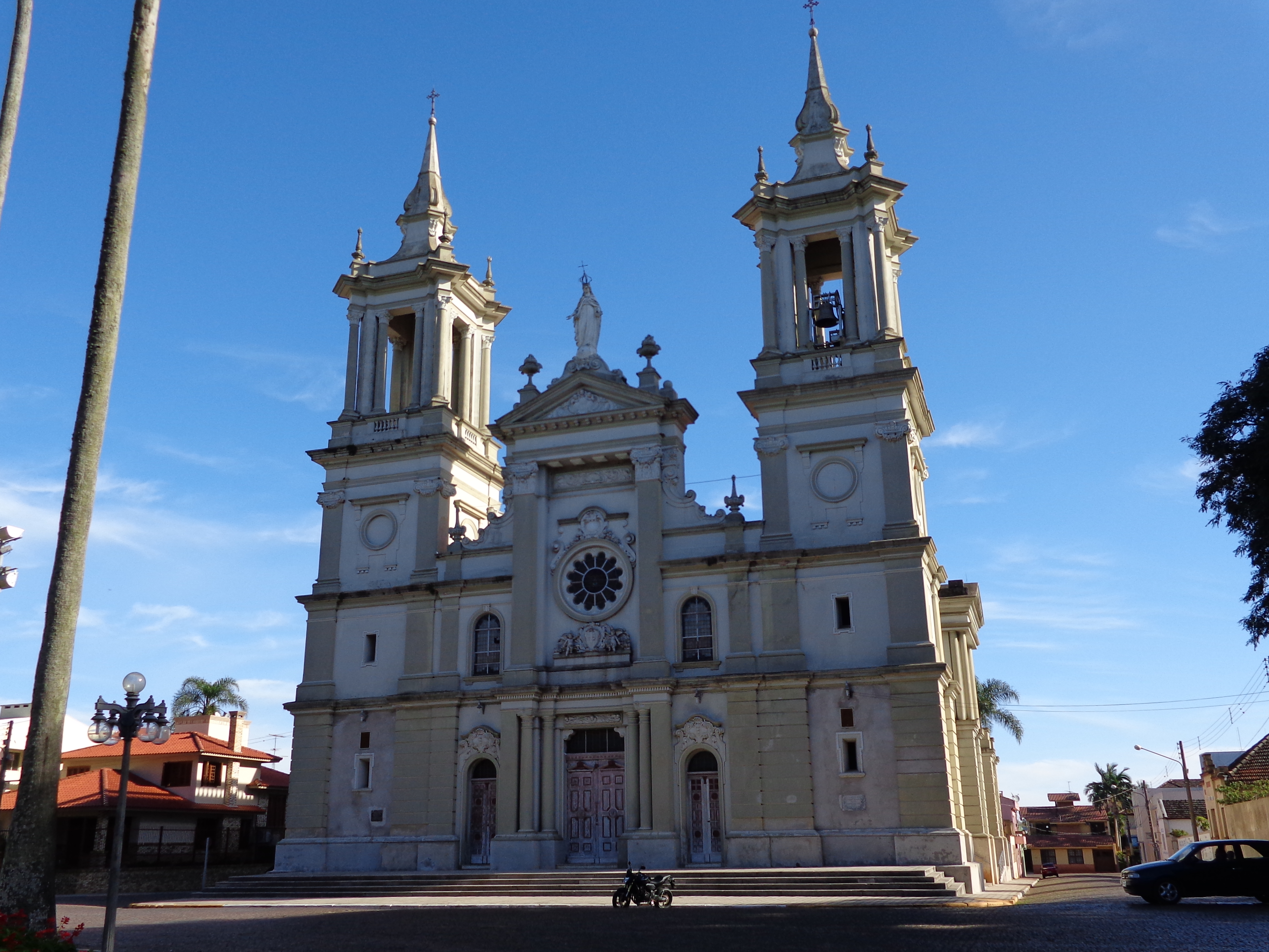 Catedral Nossa Senhora da Conceição, Cachoeira do Sul - RS - Brasil